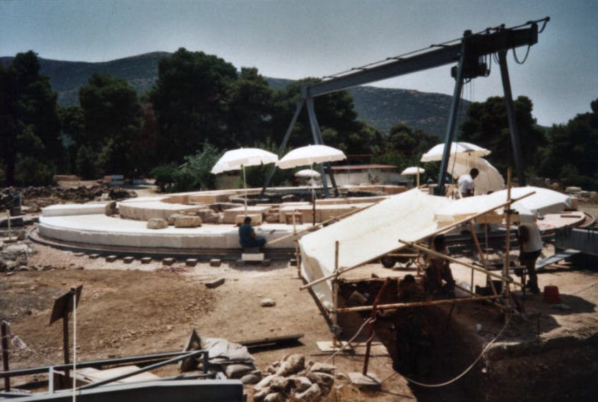 Eigenes Foto: Tholos in Epidauros. Urheberrechtlich werden keine Ansprüche geltend gemacht.